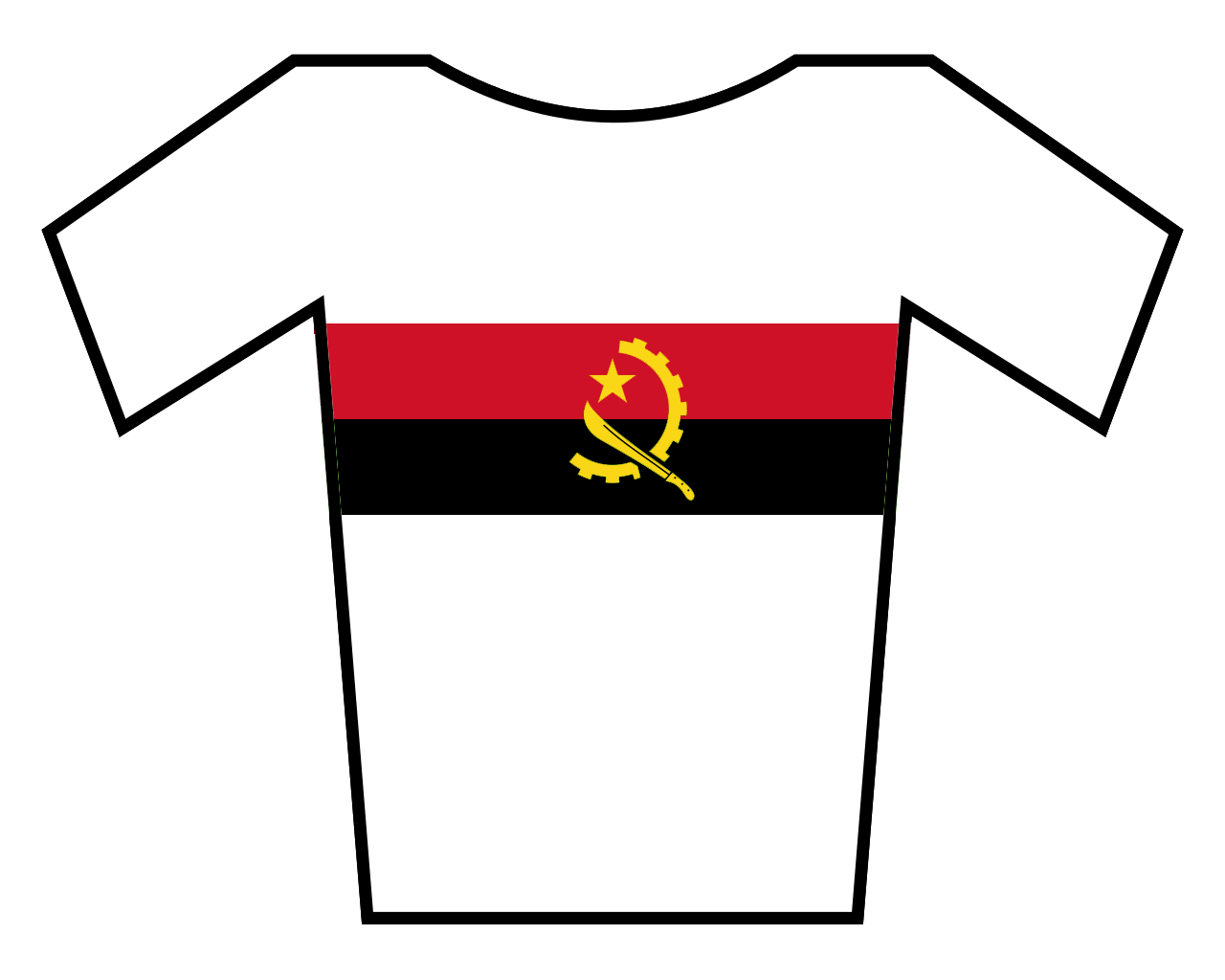 Wielertrui van Angola